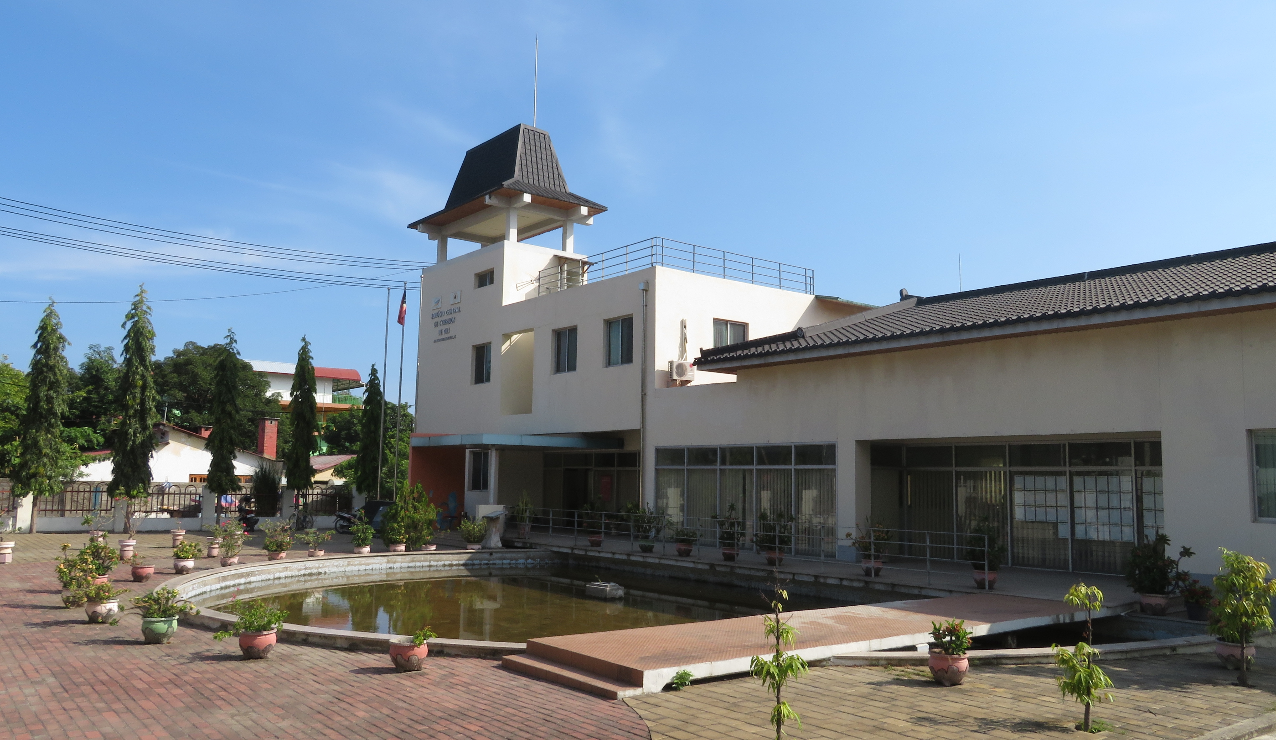 Hauptpost, Dili. Osttimor